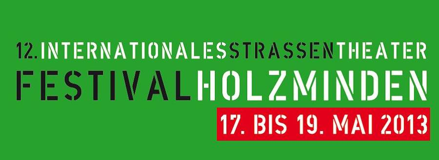 Logo des 12. Internationalen Straßentheaterfestivals in Holzminden, Niedersachsen, Deutschland.